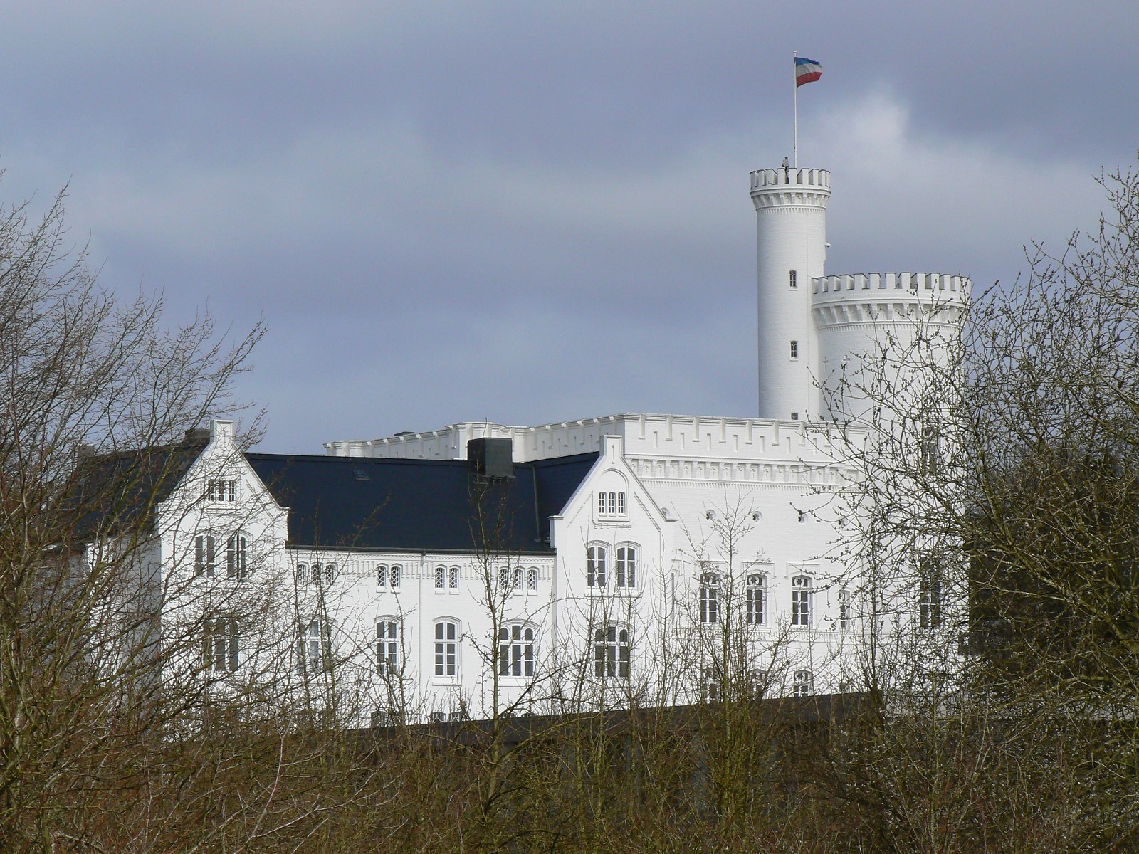 Die Blomenburg in Selent. Erbaut 1842-1857 als Jagdschloss im Tudorstil im Auftrag Otto Graf Blomes. Architekt: Eduard Knoblauch. Seit 2006 Technologiepark und Veranstaltungszentrum.